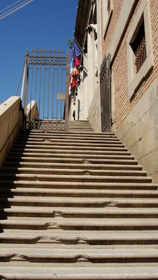 Escalinata principal de 1795 en la fachada del Palacio del Cardenal Lorenzana, antigua Real Universidad de Toledo (España)